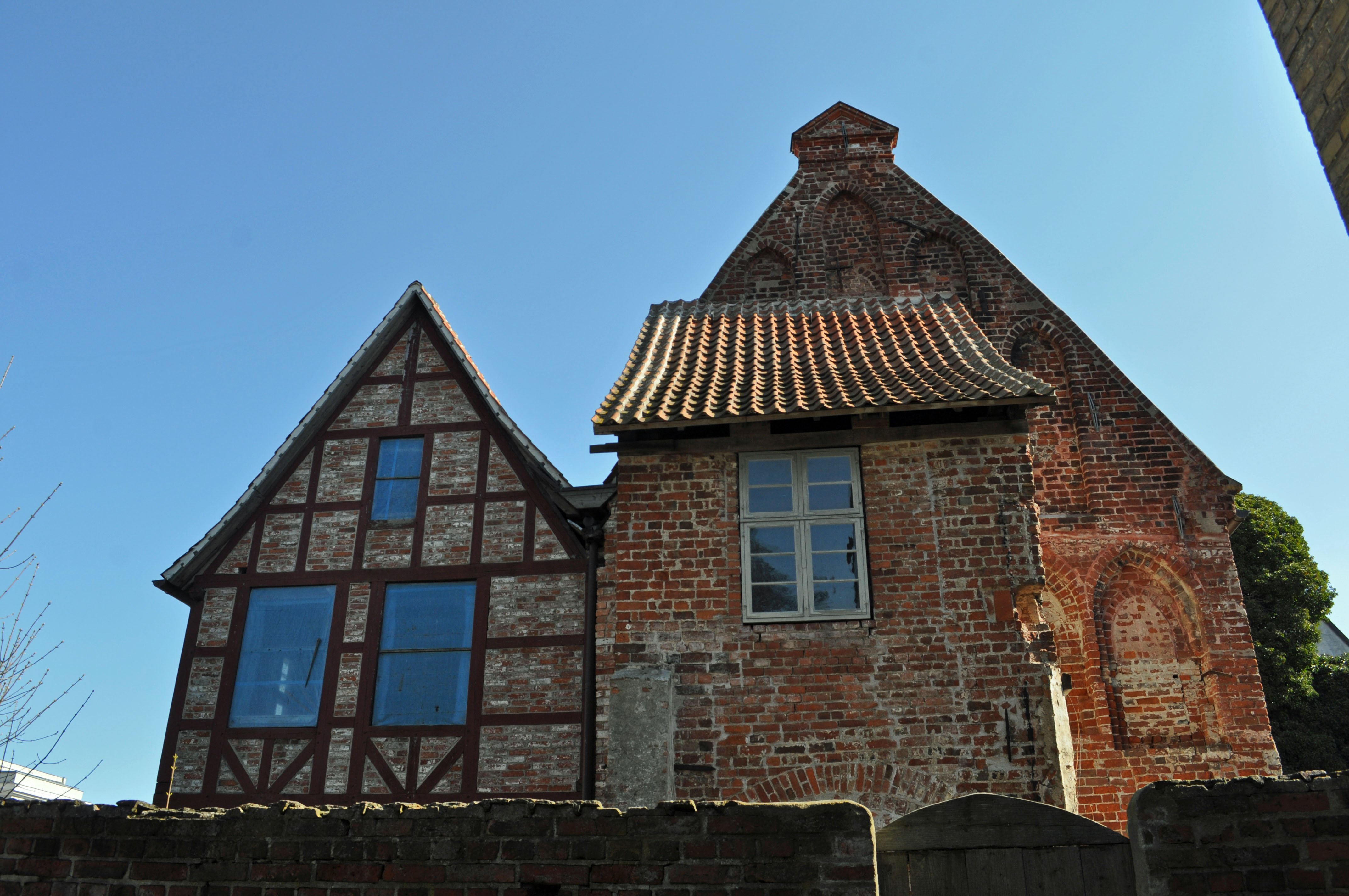 Gebäude bzw. Gebäudedetail in Stralsund. Straße und Hausnummer siehe Dateiname.